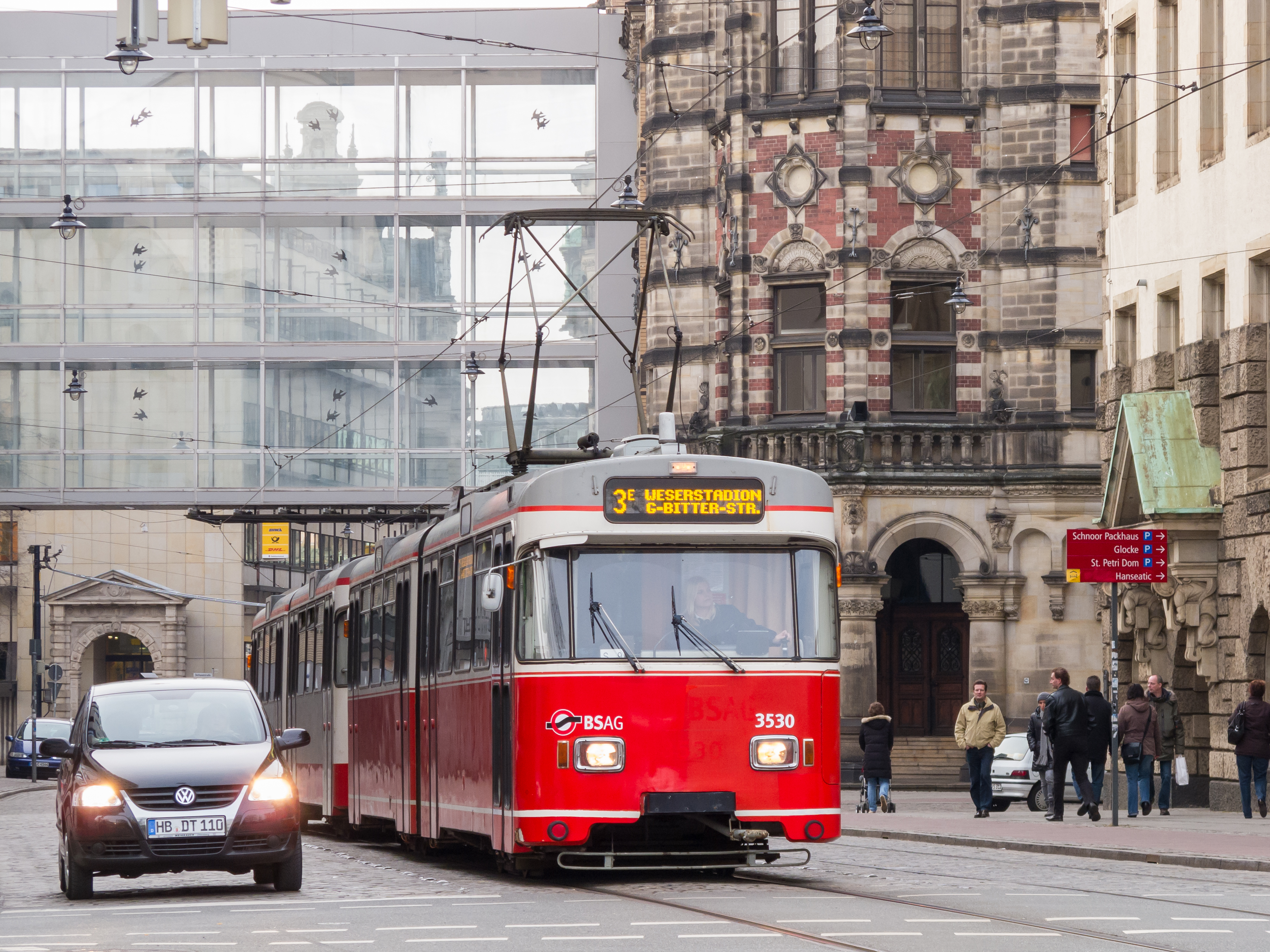 Straßenbahn (Typ GT4f) der Linie 3 in der Ostertorstraße in Bremen